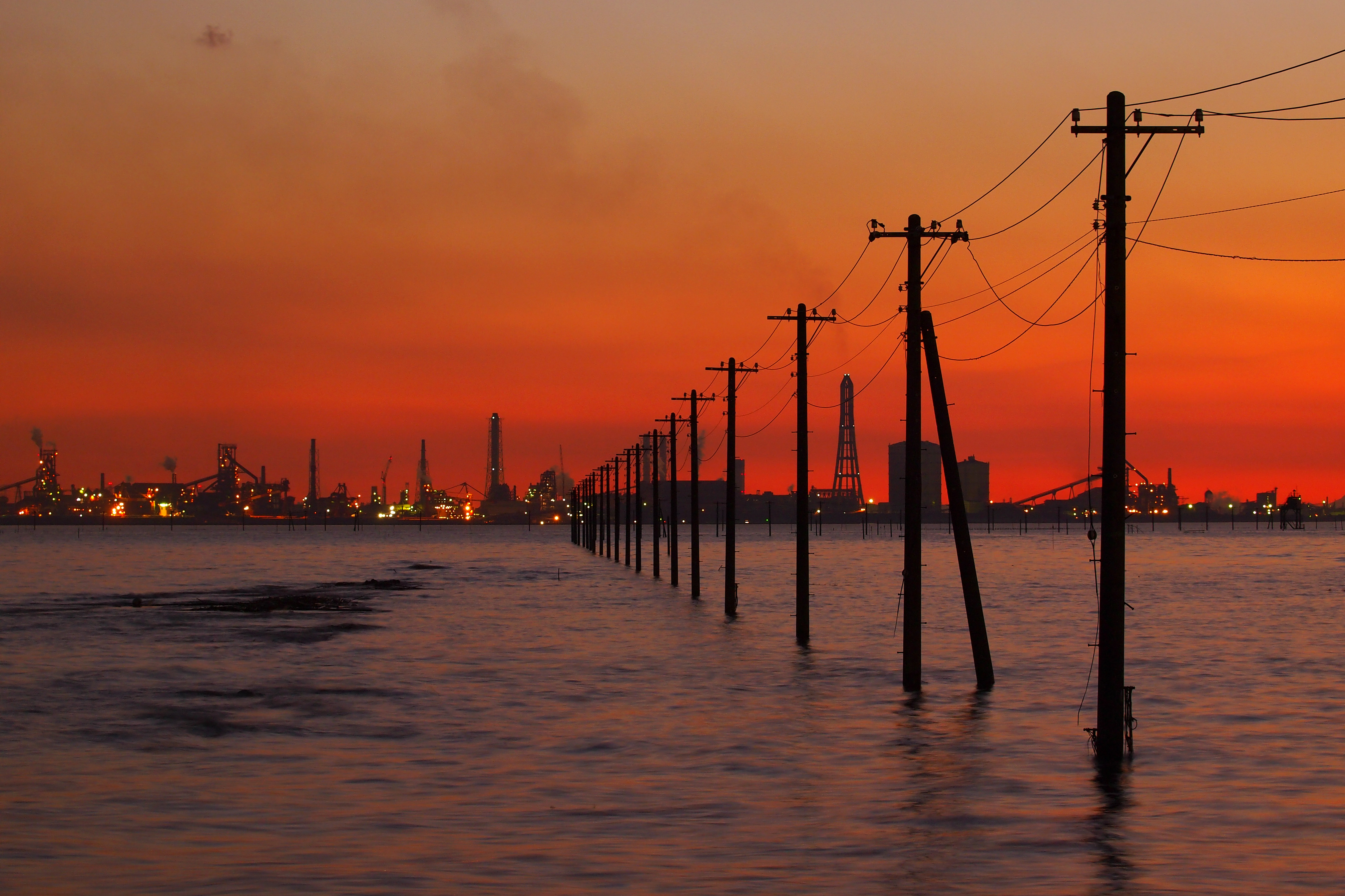 江川海岸の夕暮れ。Panoramioより転載。